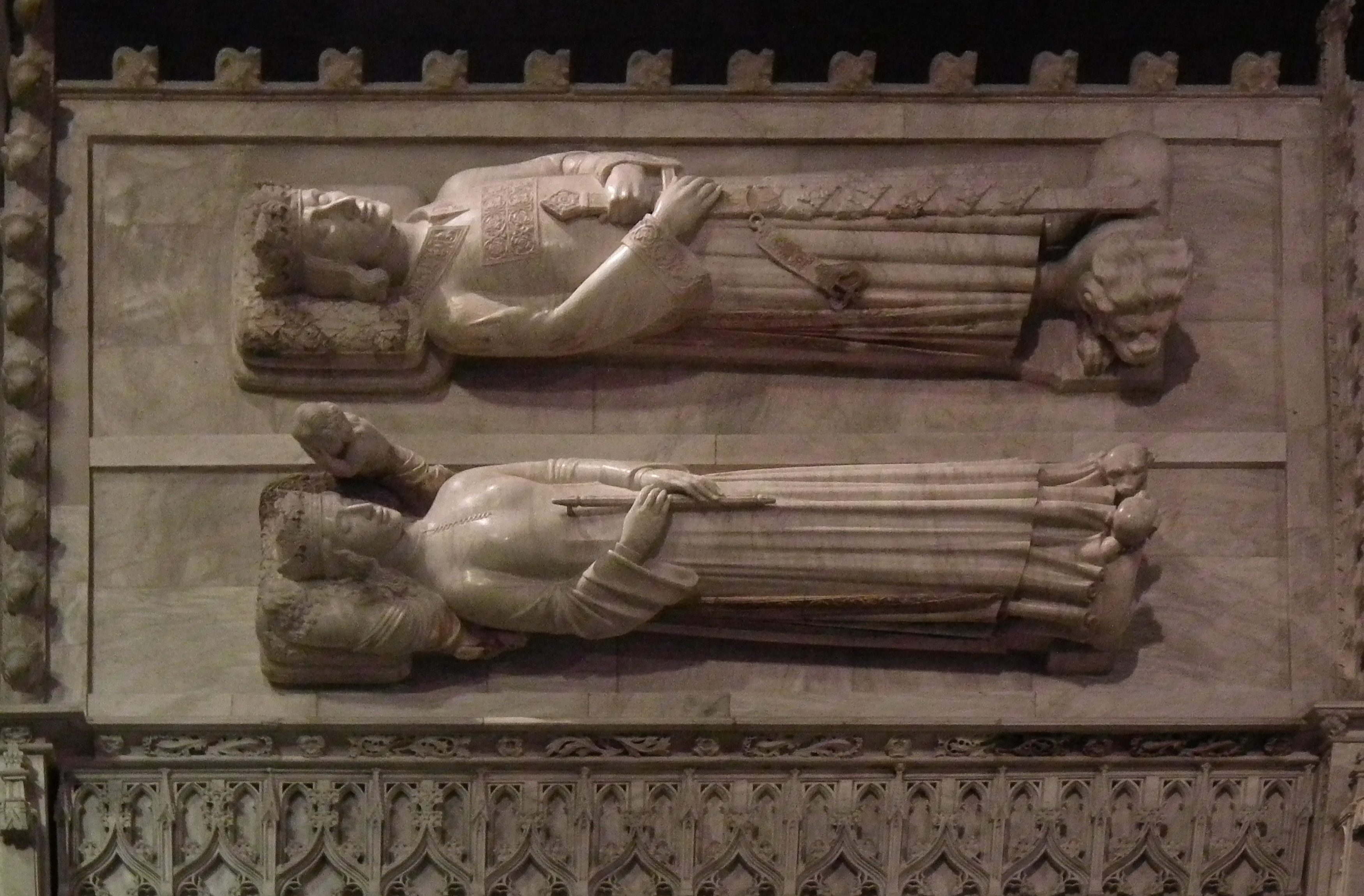 Reial Monestir de Poblet, Spain